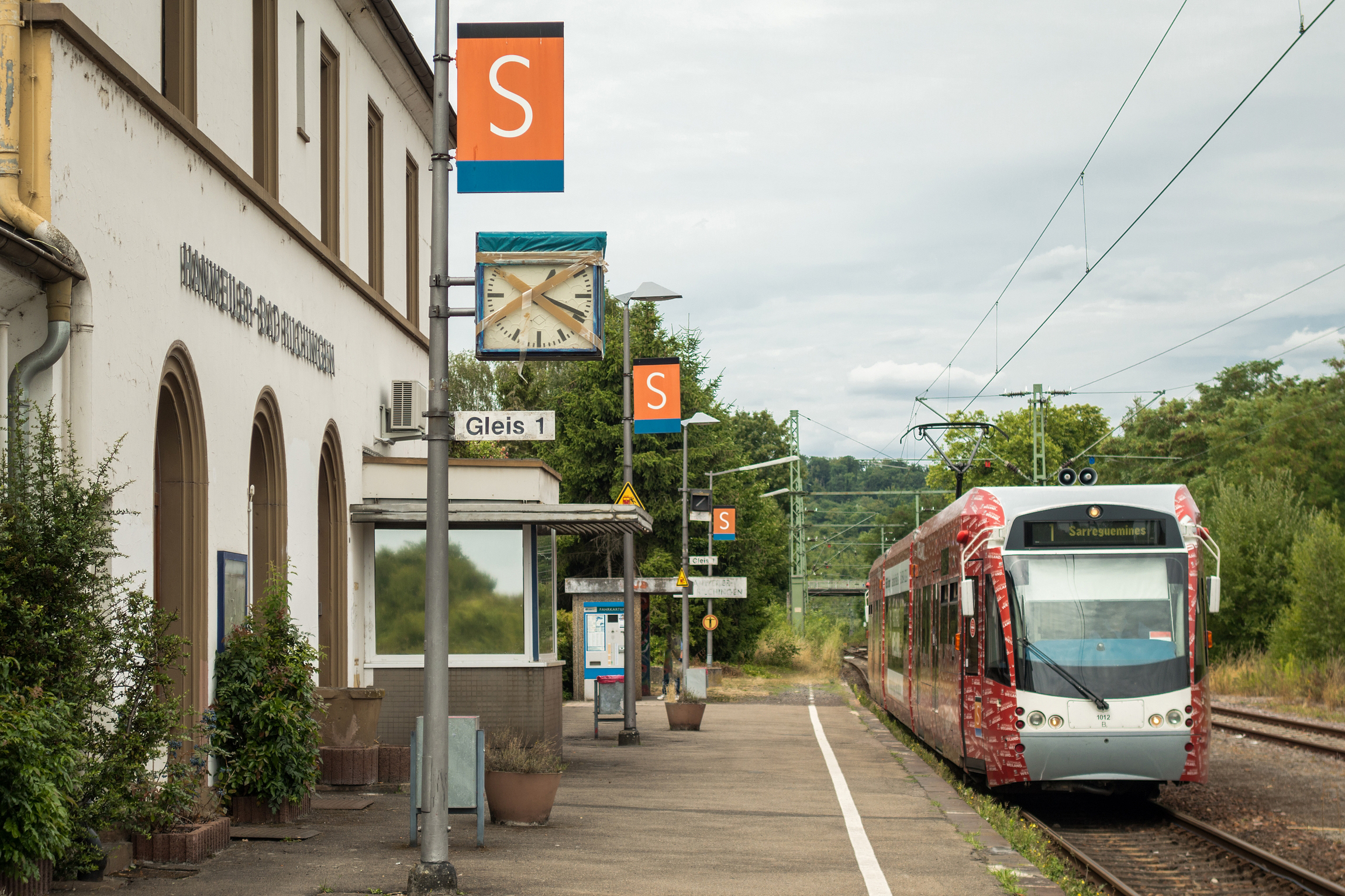 Bahnhof Hanweiler - Bad Rilchingen